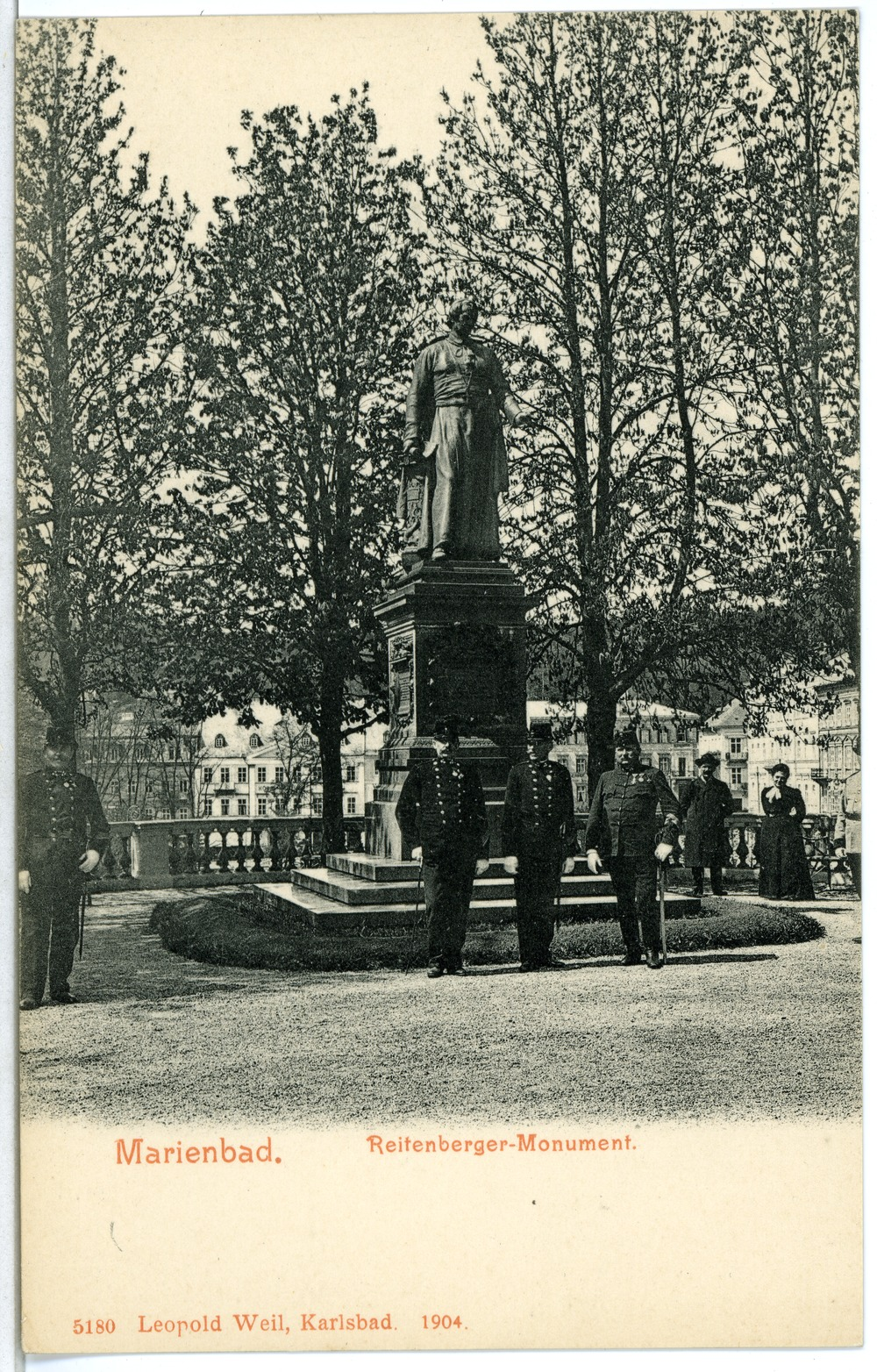 Marienbad; Reitenberger - Monument This postcard is from publisher Brück & Sohn in Meißen ( This postcard has a unique number 05180 and is available in a higher resolution at the publisher. This images was uploaded in a cooperation project between Wikipedians and the publisher.